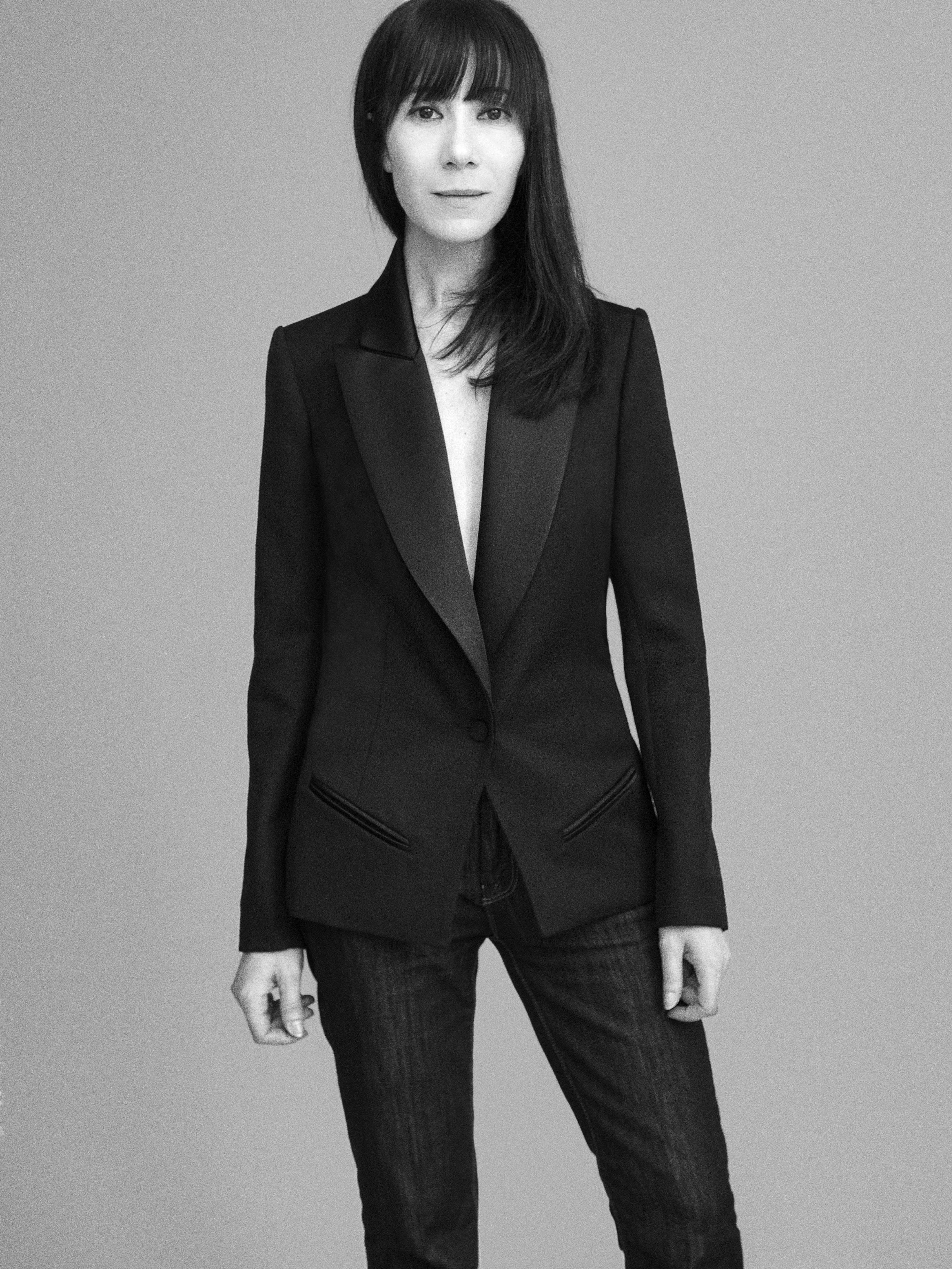 Portrait de Bouchra Jarrar, Paris, 2016.